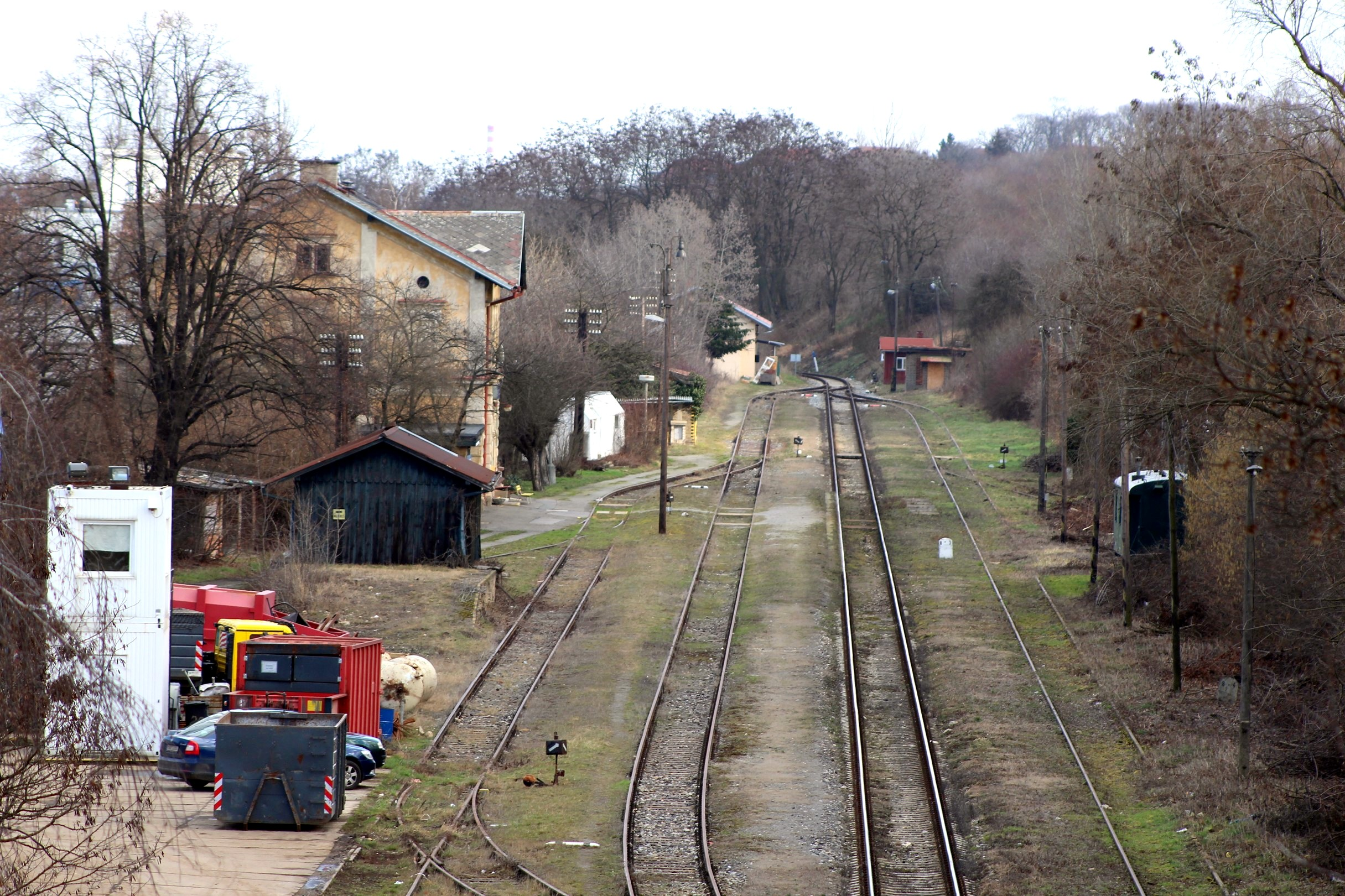 Nádraží Praha-Jinonice